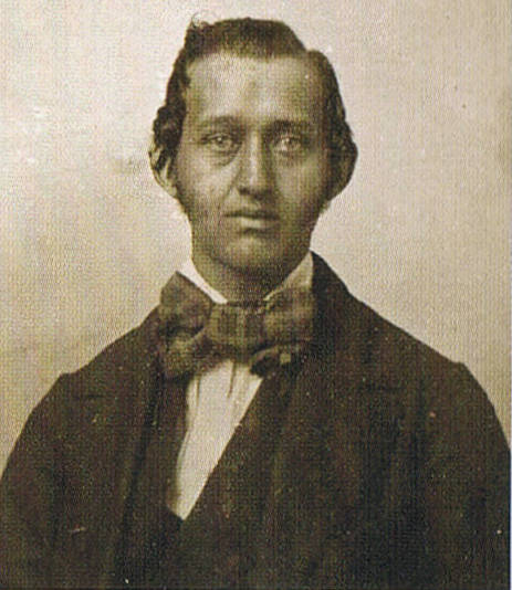 Alexander Solomon Walbridge (1828-1897), industriel, inventeur et constructeur de la grange Alexander-Solomon-Walbridge à Saint-Ignace-de-Stanbridge, Québec